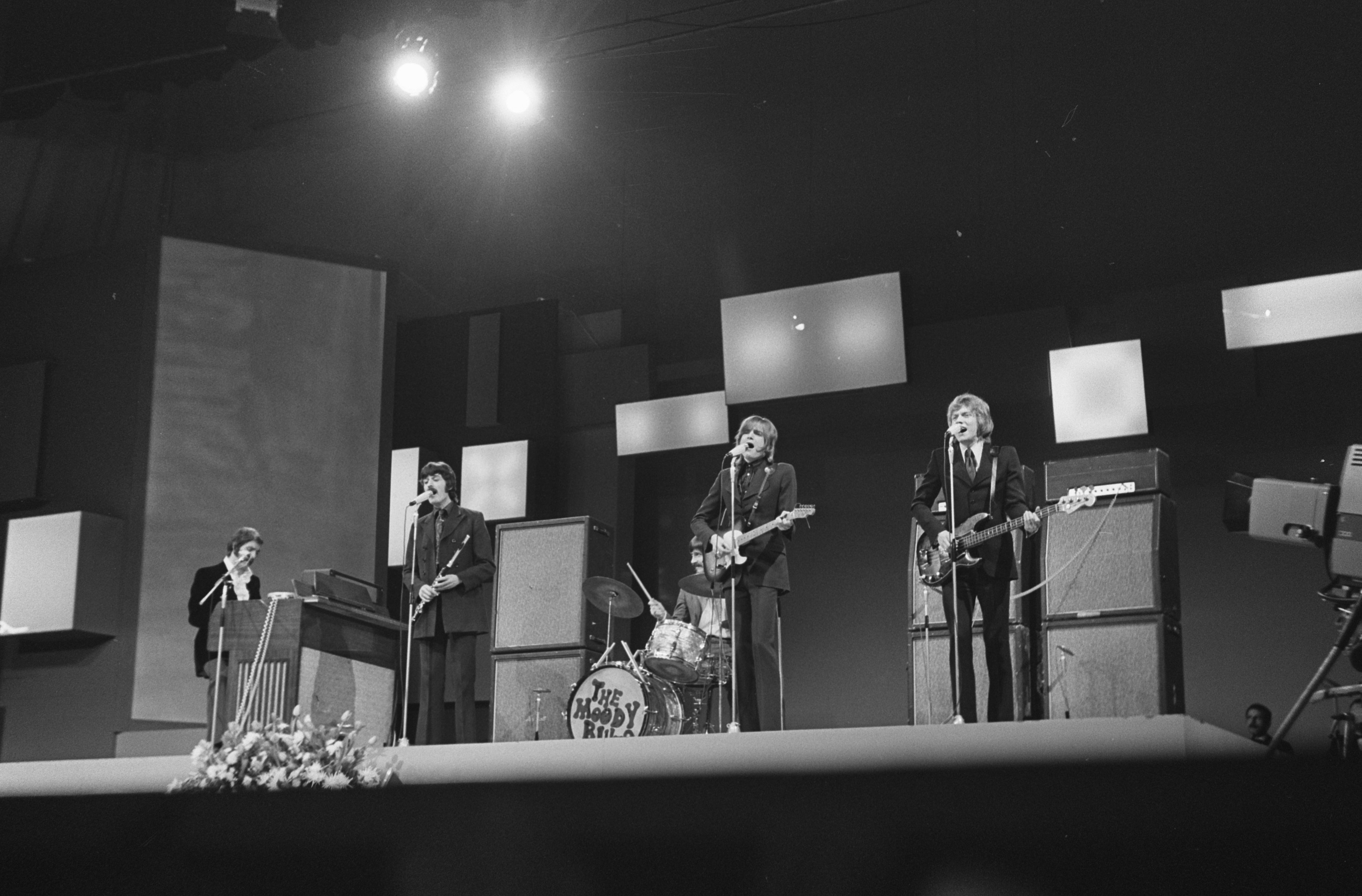 Collectie / Archief : Fotocollectie Anefo Reportage / Serie : Grand Gala du Disque Populaire in Congrescentrum Beschrijving : Moody Blues Datum : 7 maart 1969 Trefwoorden : muziek, popgroepen Fotograaf : Fotograaf Onbekend / Anefo Auteursrechthebbende : Nationaal Archief Materiaalsoort : Negatief (zwart/wit) Nummer archiefinventaris : bekijk toegang 2.24.01.05 Bestanddeelnummer : 922-1824